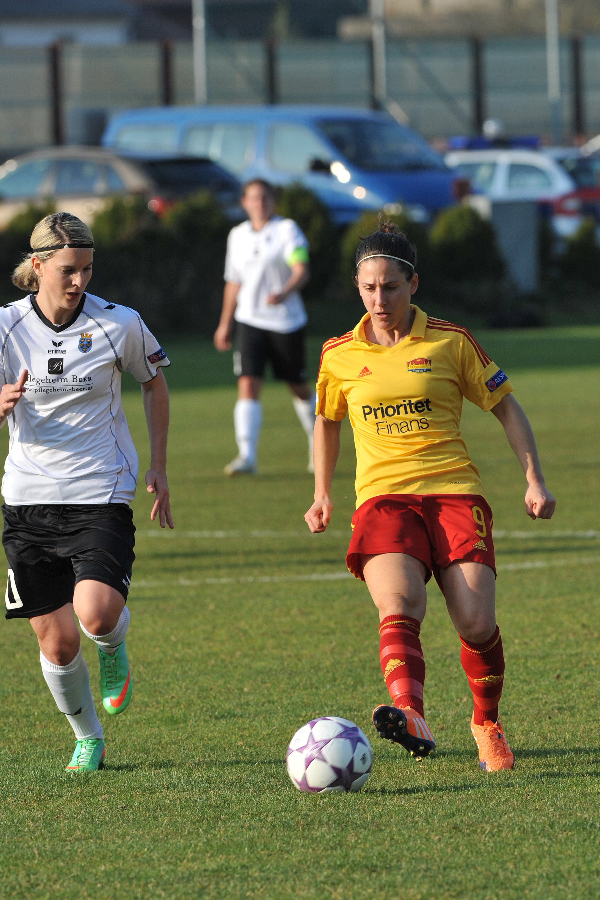 UEFA Women's Champions League 2013/14 SV Neulengbach - Tyresö FF Neulengbach, 29. März 2014 Verónica Boquete